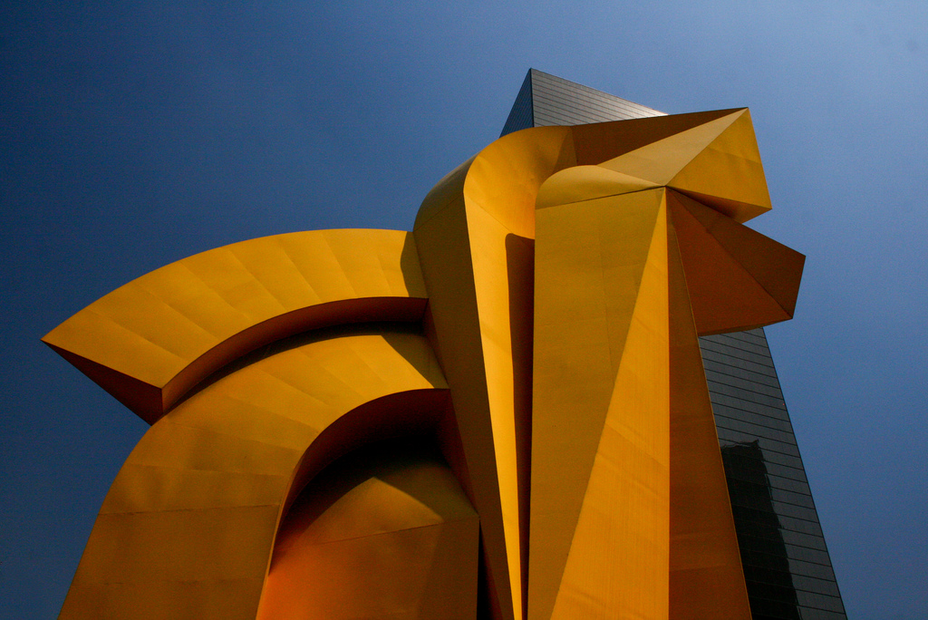 Escultura El Caballito de Sebastian